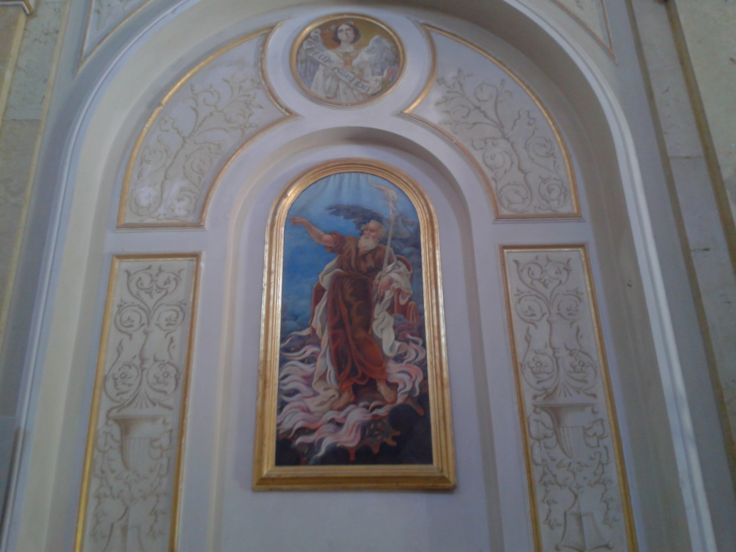 Sant'Elia profeta chiesa del Carmine di Palmi